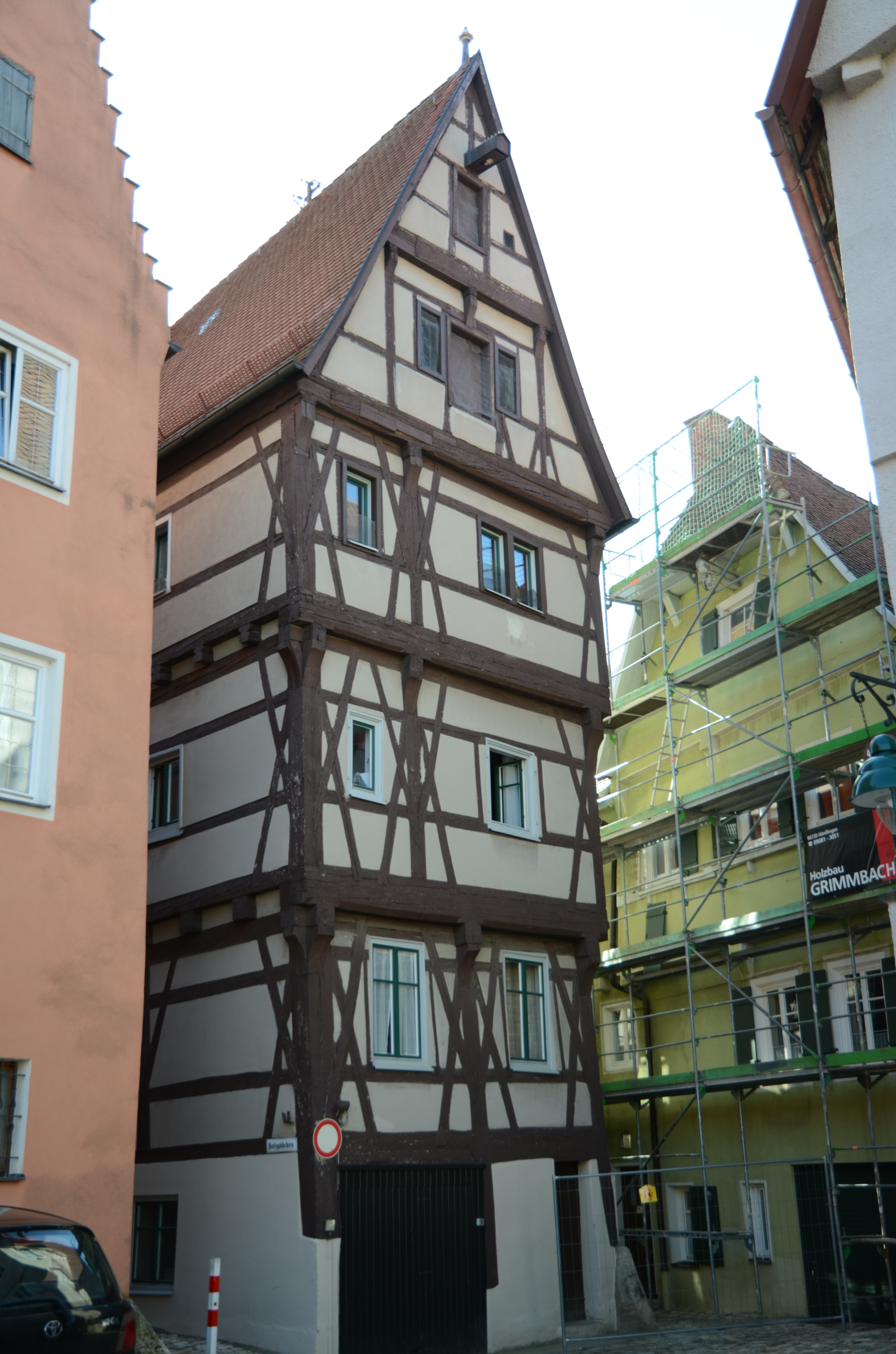 Nördlingen, Marktplatz 21, 20 Rückseite